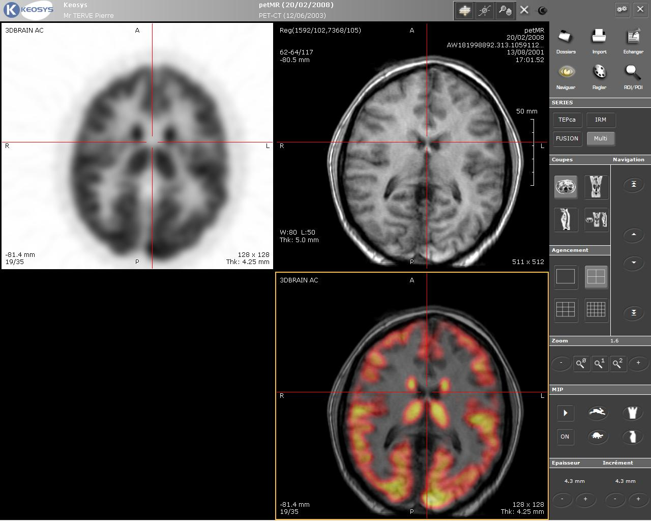 PET-IRM-cabeza-Keosys